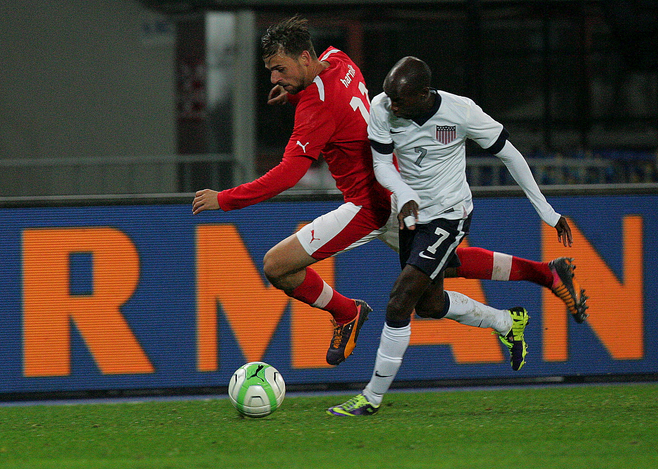 Freundschaftliches Länderspiel Österreich - USA 19.11.2013 in Wien: DaMarcus Beasley, Martin Harnik